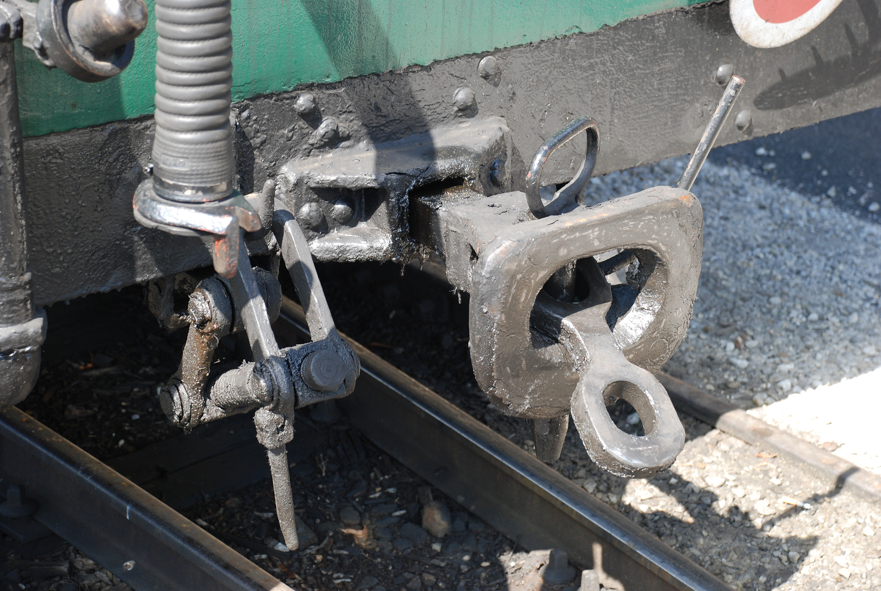 Stainzer Lokalbahn, Flascherlzug, Kupplung eines Eisenbahnwagens